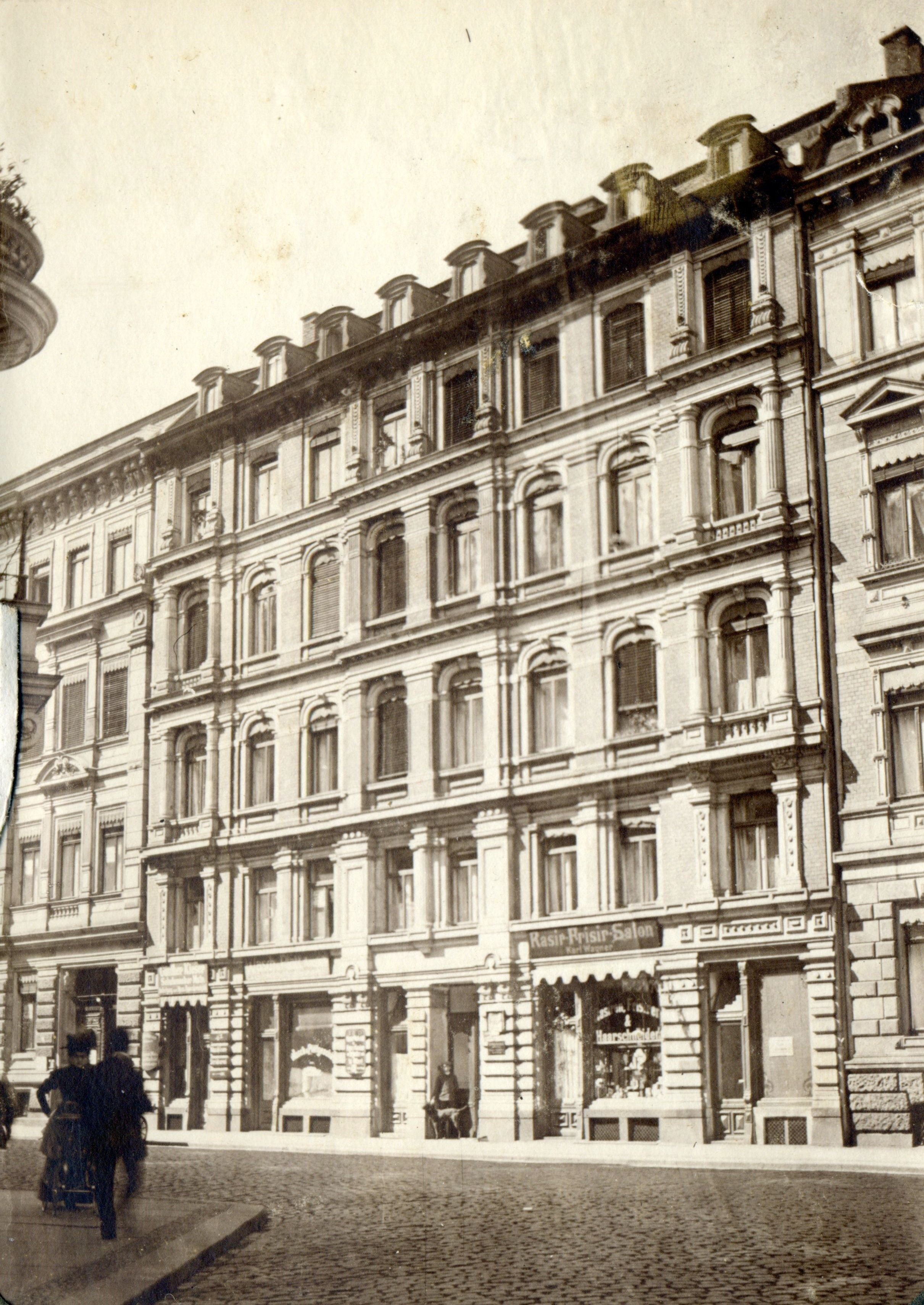 Fassade Gottschedstraße 22